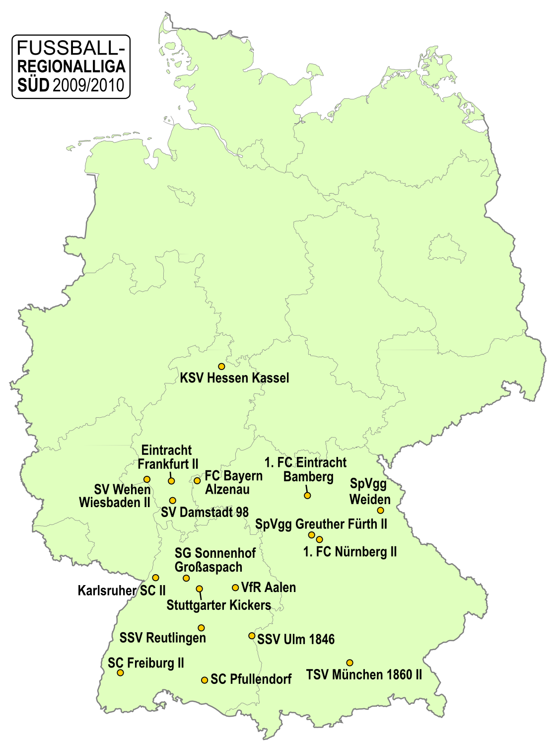 Karte der Vereine der Fußball-Regionalliga Süd, Saison 2009/2010